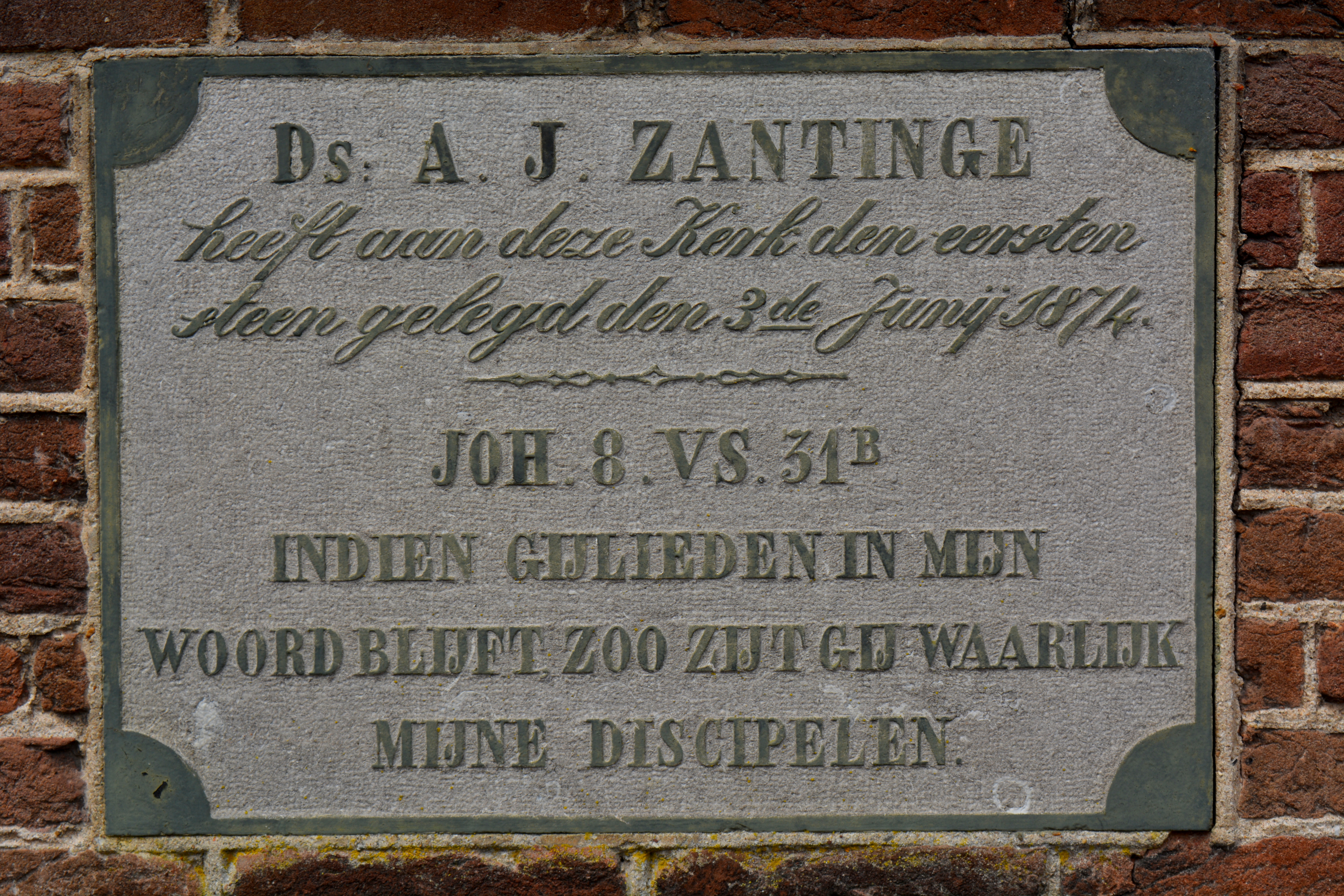 Oentsjerk, Ontmoetingskerk, gevelstien ta oantinken fan de earstestienlizzing yn 1874